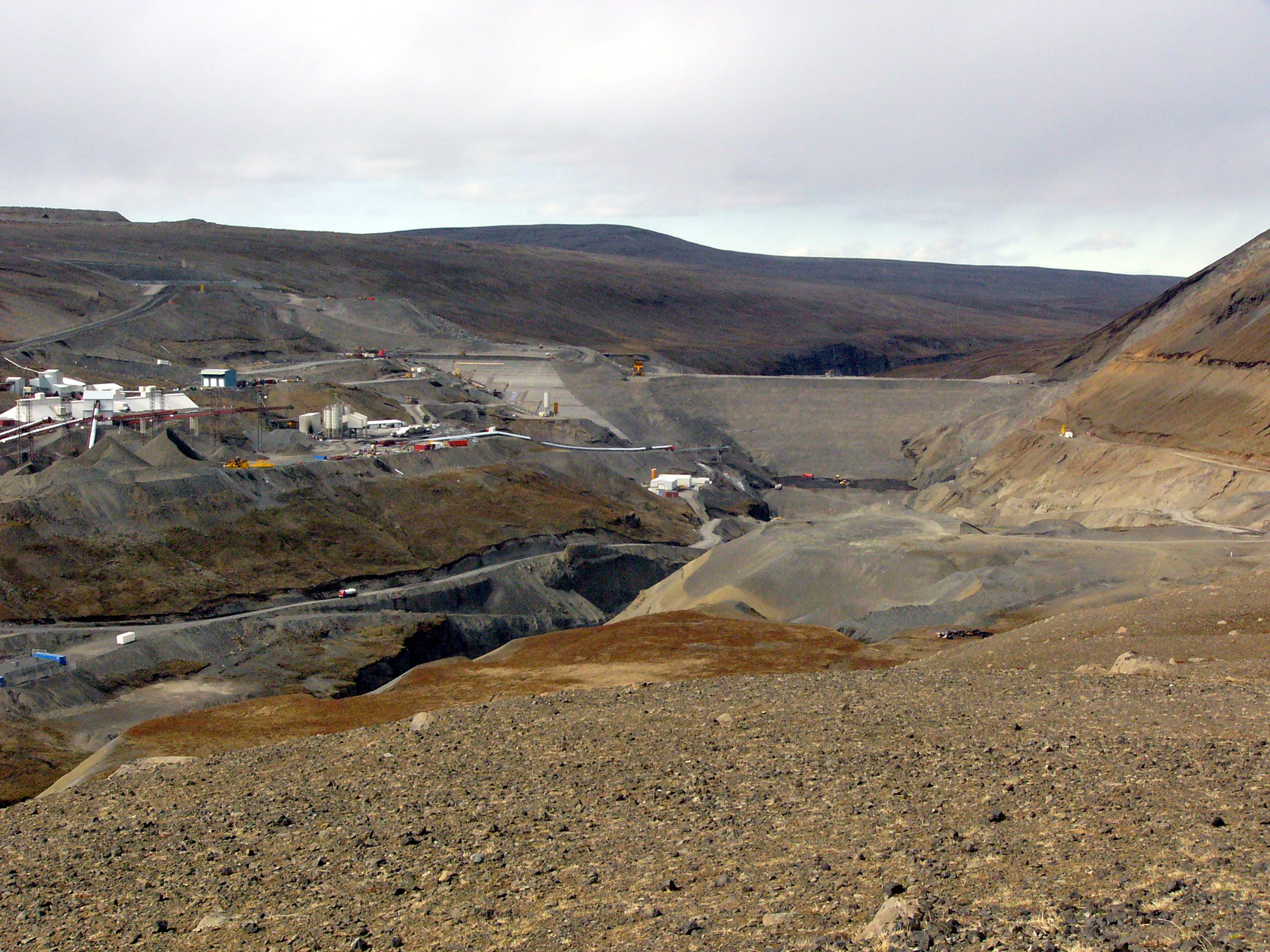 Kárahnjúkur in Iceland.